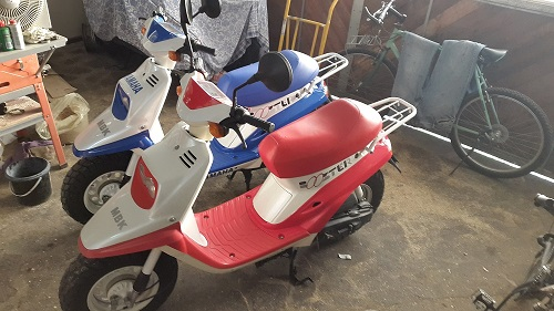 Coppia di Booster MBK anno 1991 Nelle livree Bianco e Blu e Bianco e Rosso